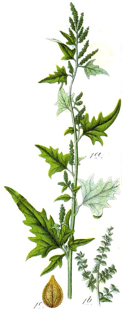 1. Atriplex sagittata Borkh., syn. A. nitens Schkuhr ;Original Caption: 1. Glanz-Melde, Chenopodium dubium nitens